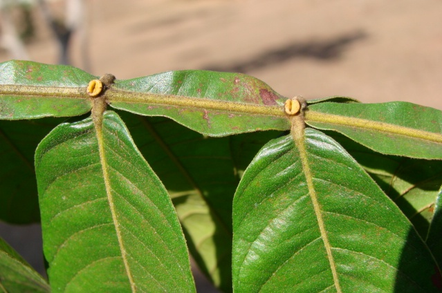 Leaves of Inga edulis Mart. - FABACEAE - Bosque do IBAMA - Brasília - Distrito Federal - Brasil.